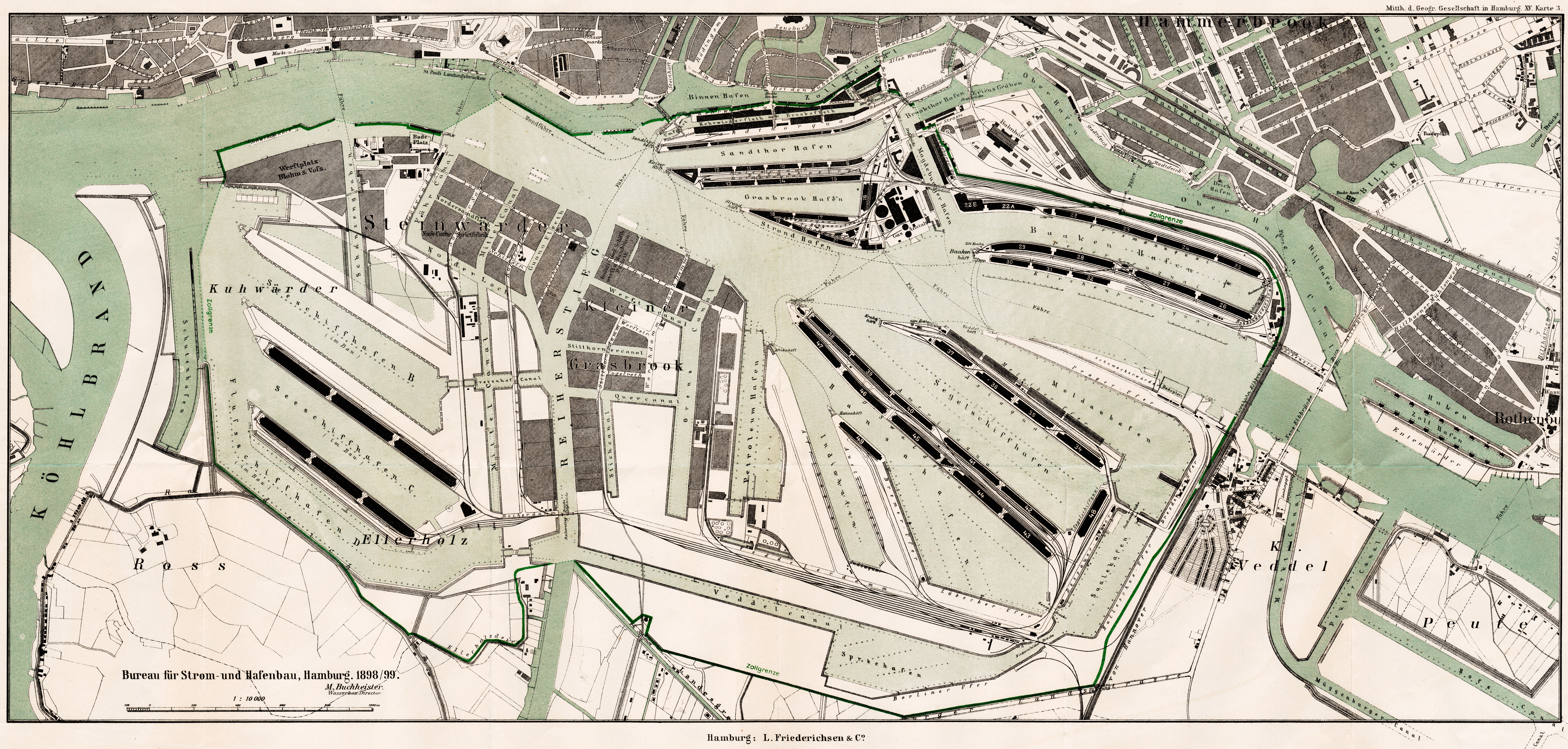 Hamburger Freihafen 1898/1899